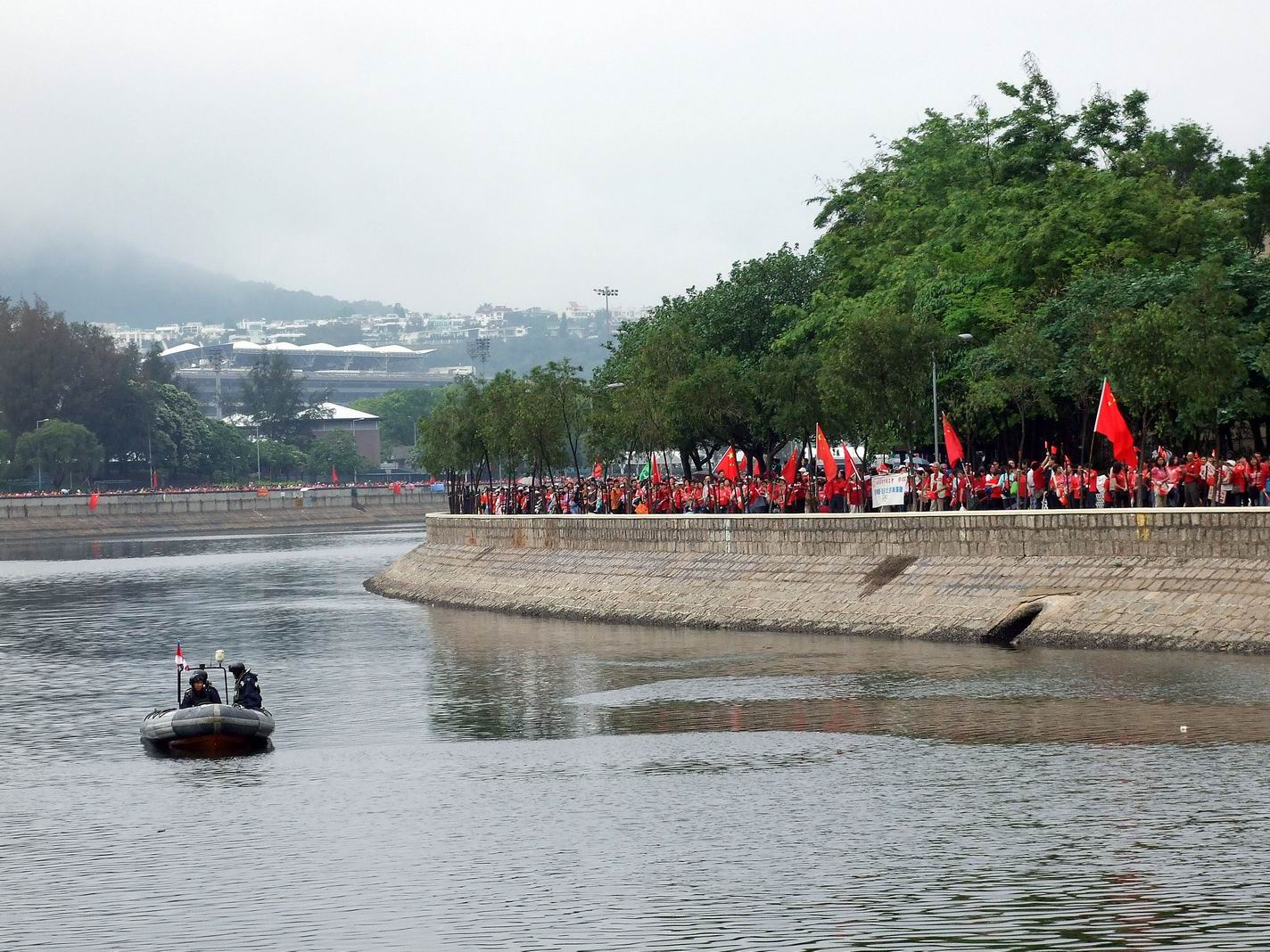 水警快艇巡邏